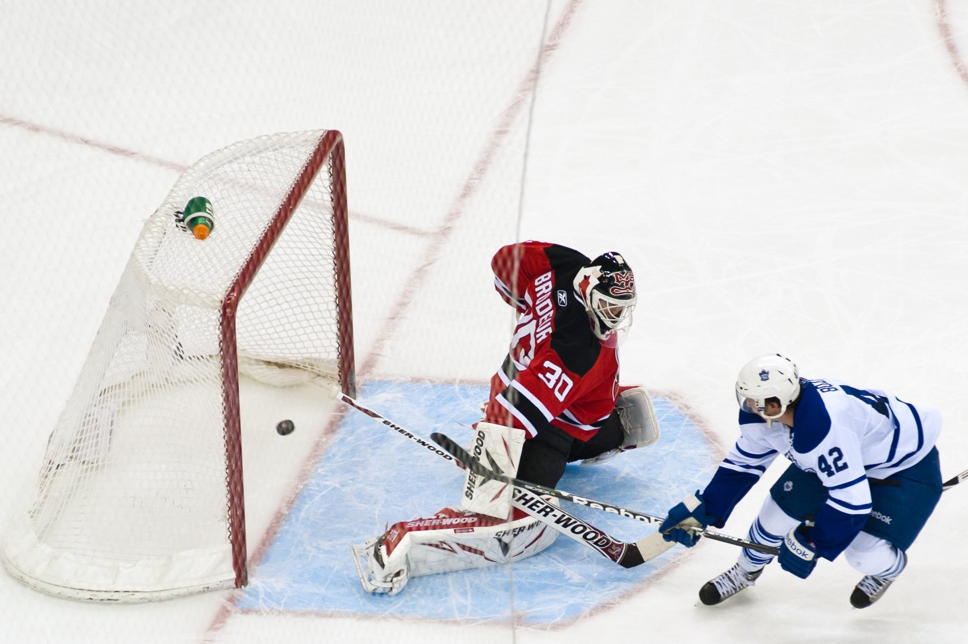 Martin Brodeur vs. Tyler Bozak